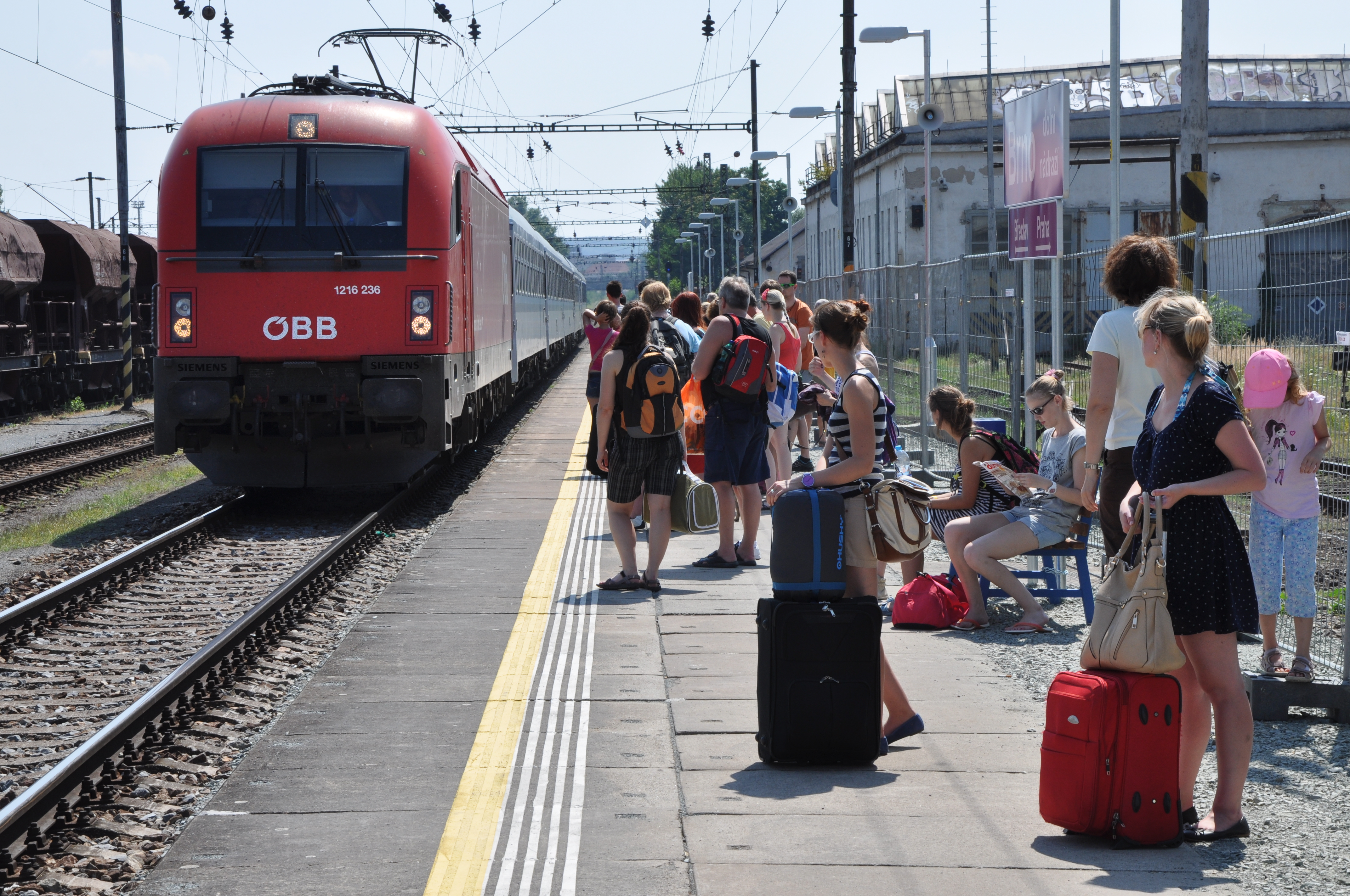 Brno dolní nádraží, v době výluky hlavního nádraží (léto 2013) zde zastavovaly vlaky EC, mezi dolním nádražím a hlavním nádražím fungovala náhradní autobusová doprava